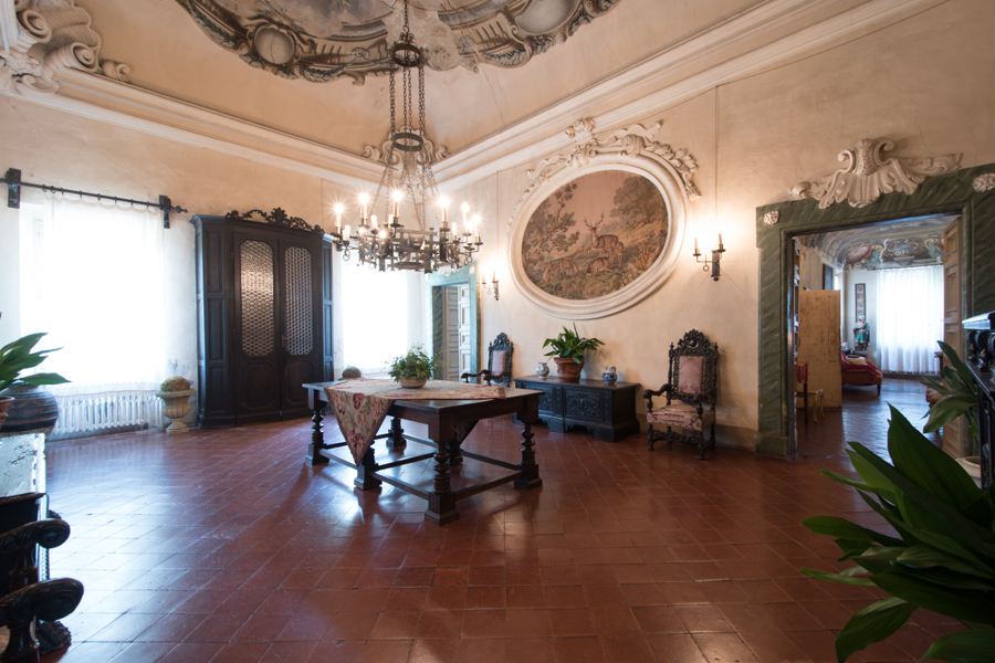 Una delle sale affrescate di Villa Cattani Stuart